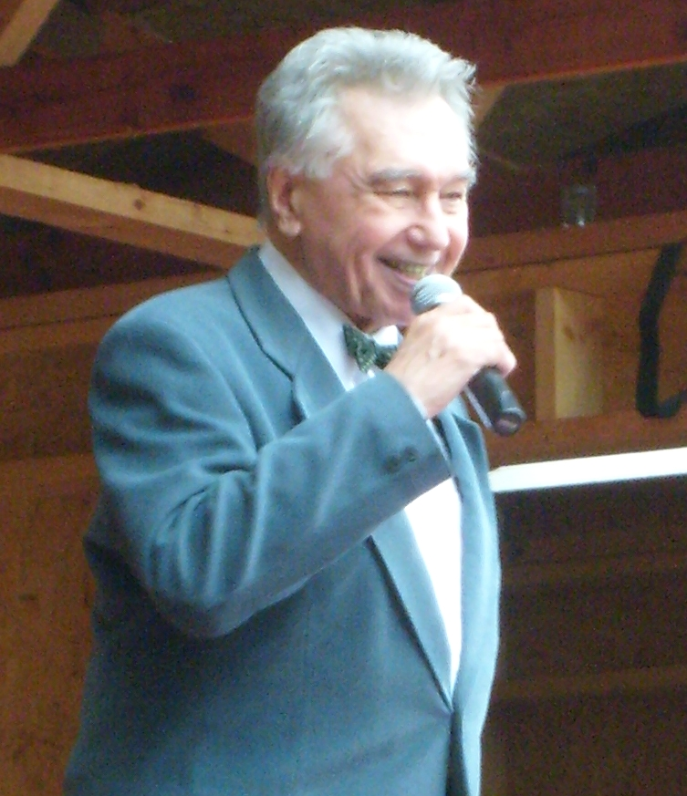 Josef Zíma